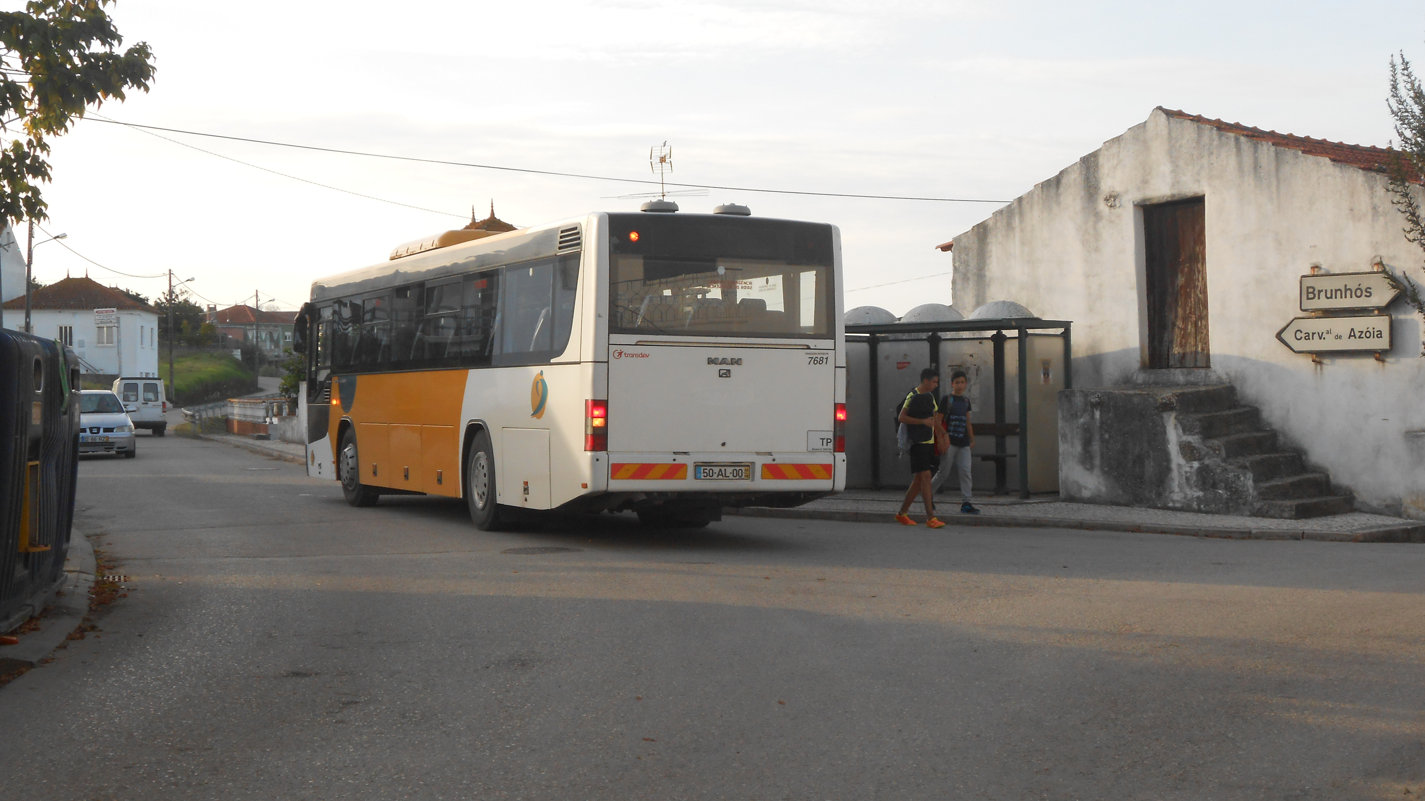 Autocarro no Cercal.